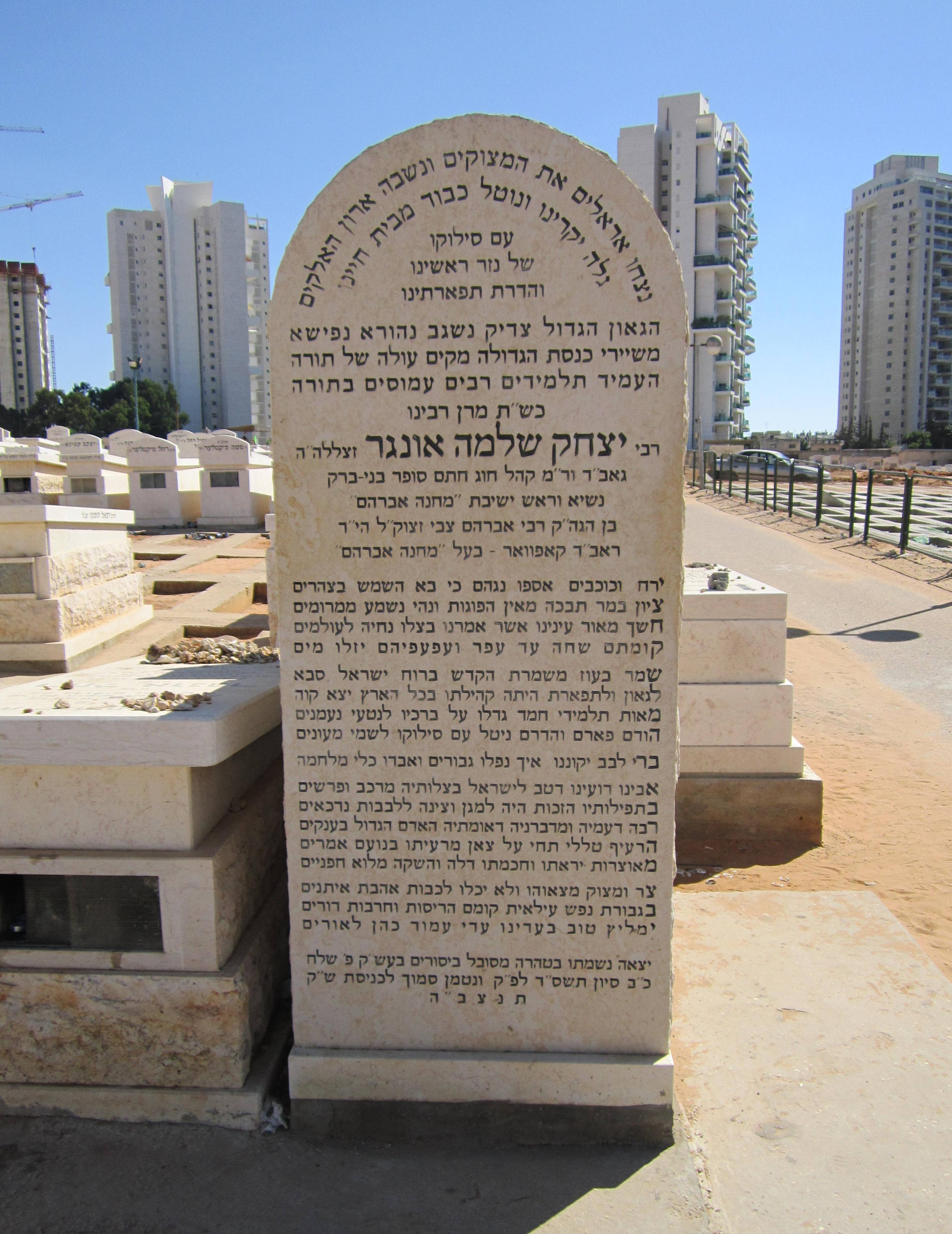 מצבת הרב יצחק שלמה אונגר